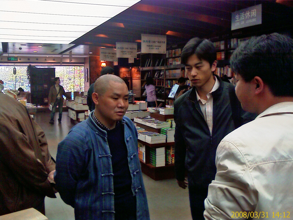 地点重庆，冉云飞 正在与 读者交流。